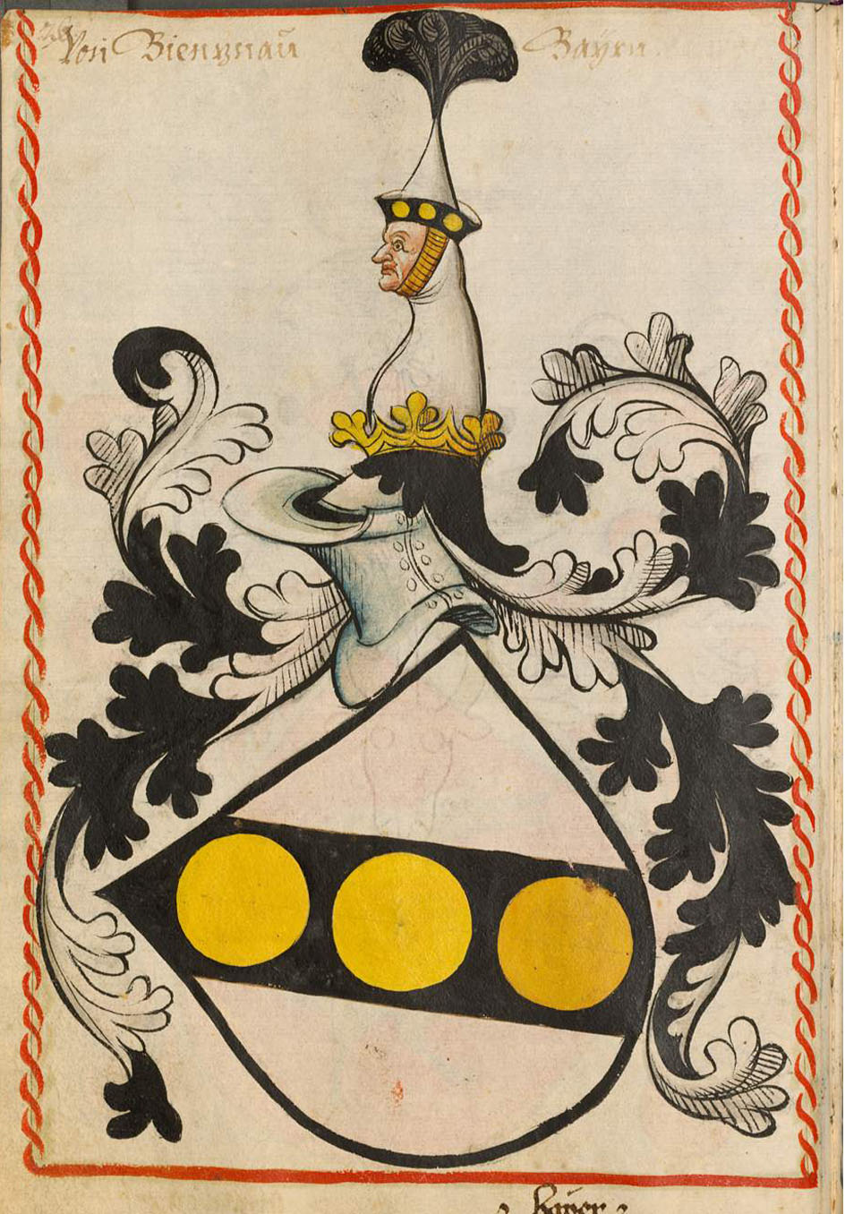 Scheibler'sches Wappenbuch , älterer Teil Bayern Pientzenau